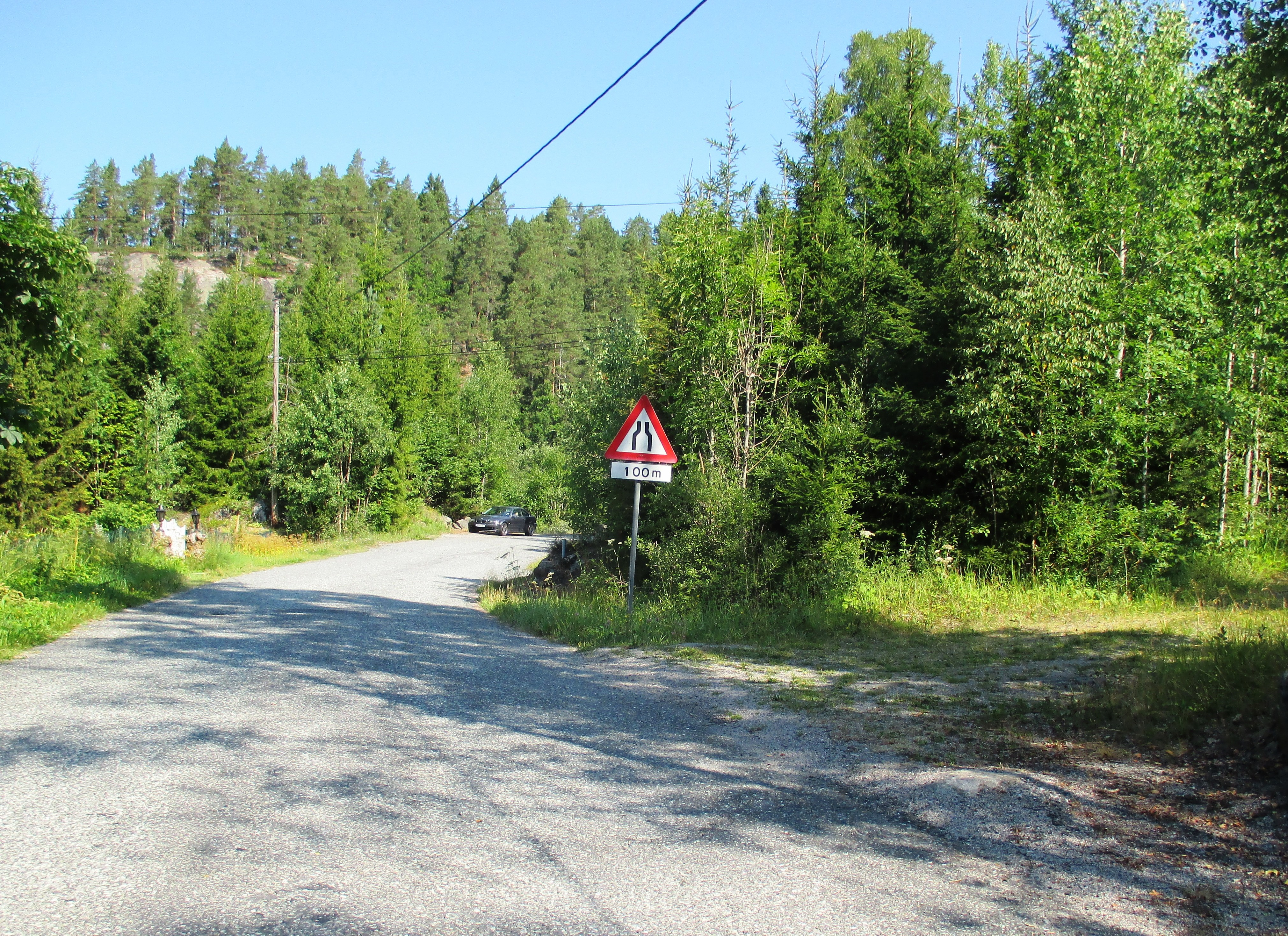 Fylkesvei 211 like nord for E18